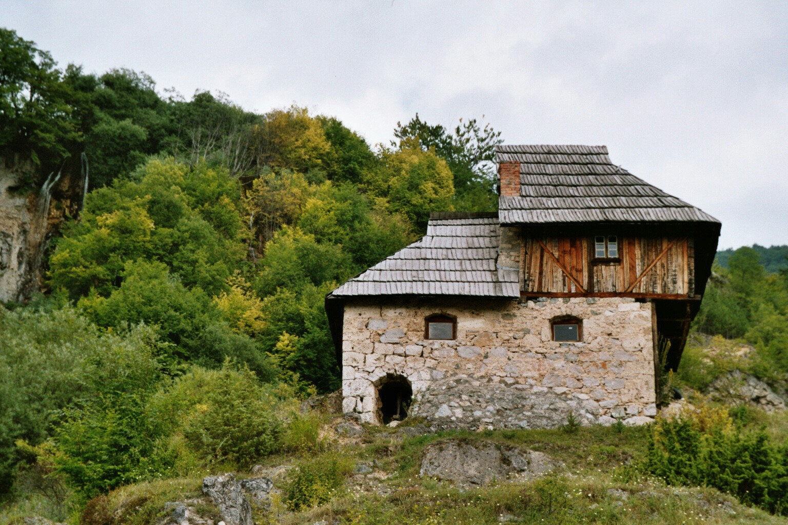 Sopotnica-Haus